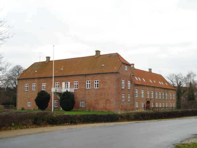 Boller Manorhouse, Jutland, Denmark